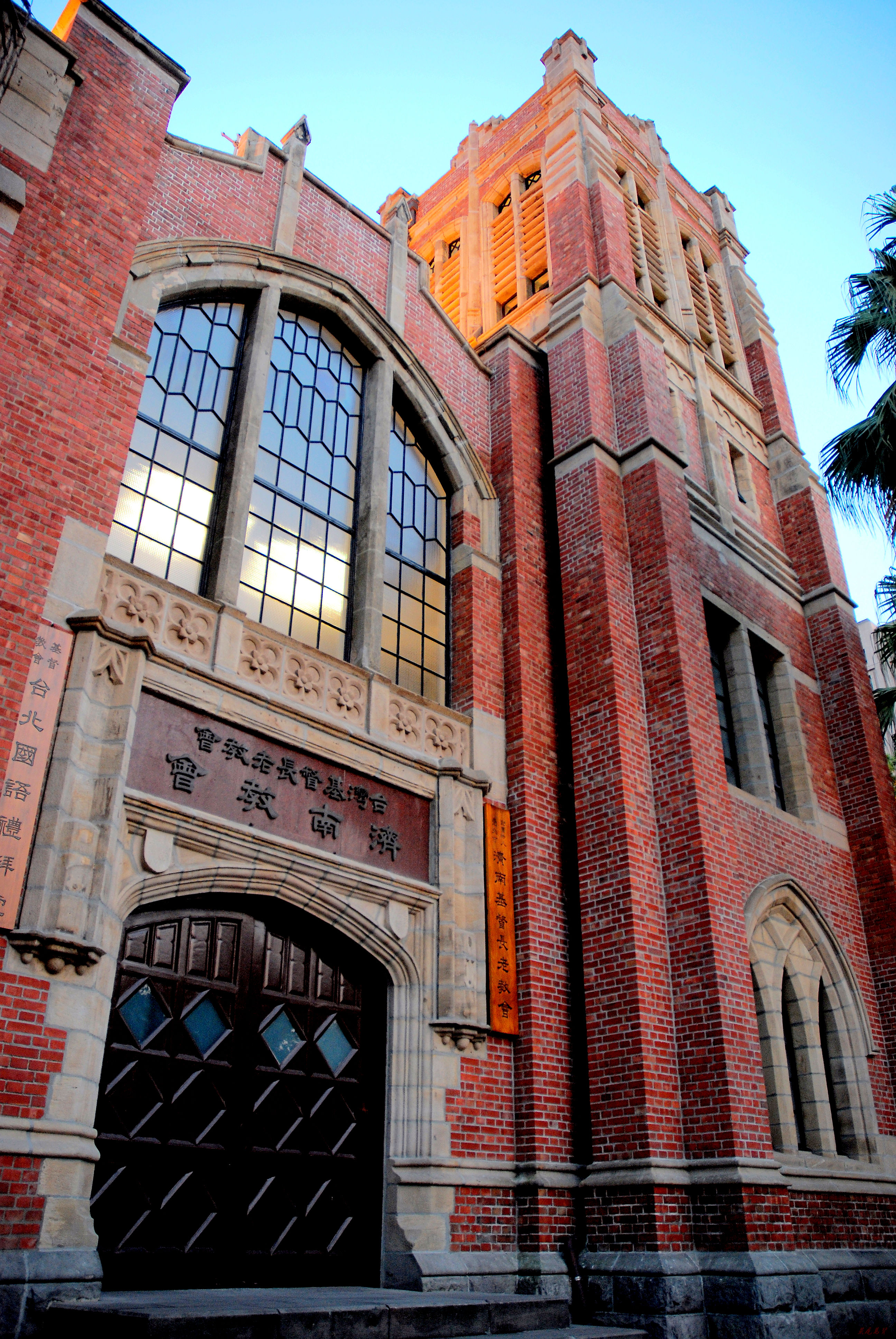 濟南基督長老教會，即台灣基督長老教會濟南教會。